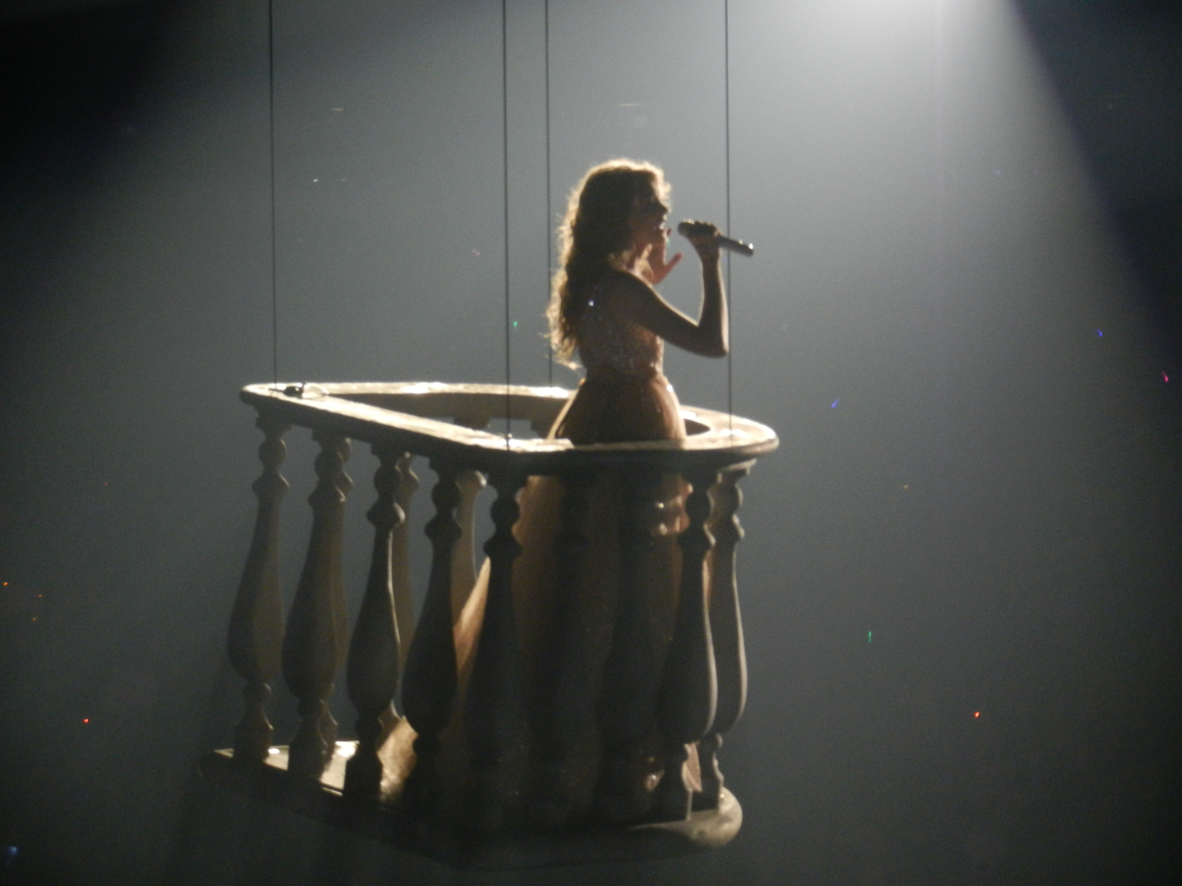 Taylor Swift Live in Vancouver in 2011